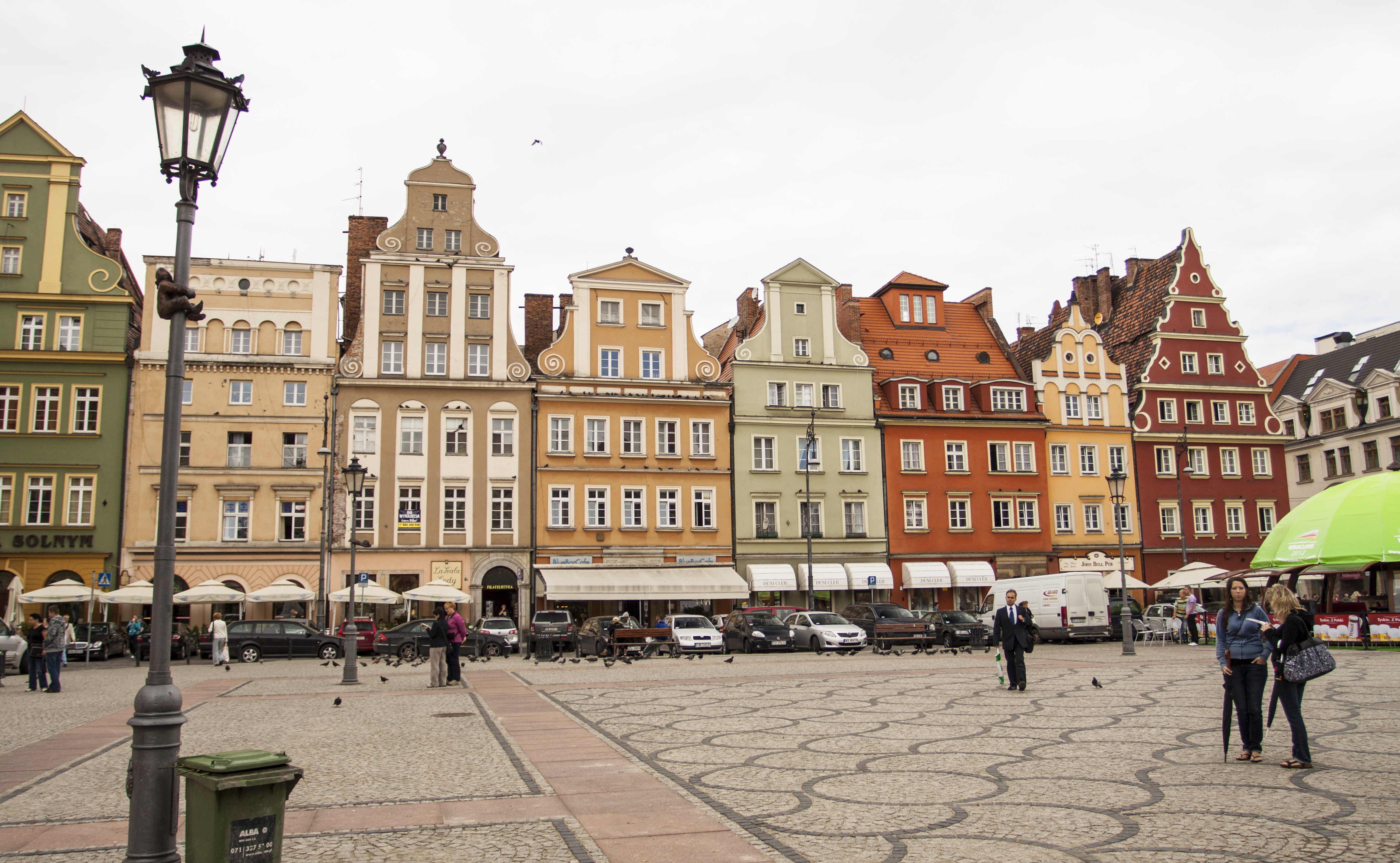 Kamienica pl. Solny 10, Miasto Wrocław - Stare Miasto